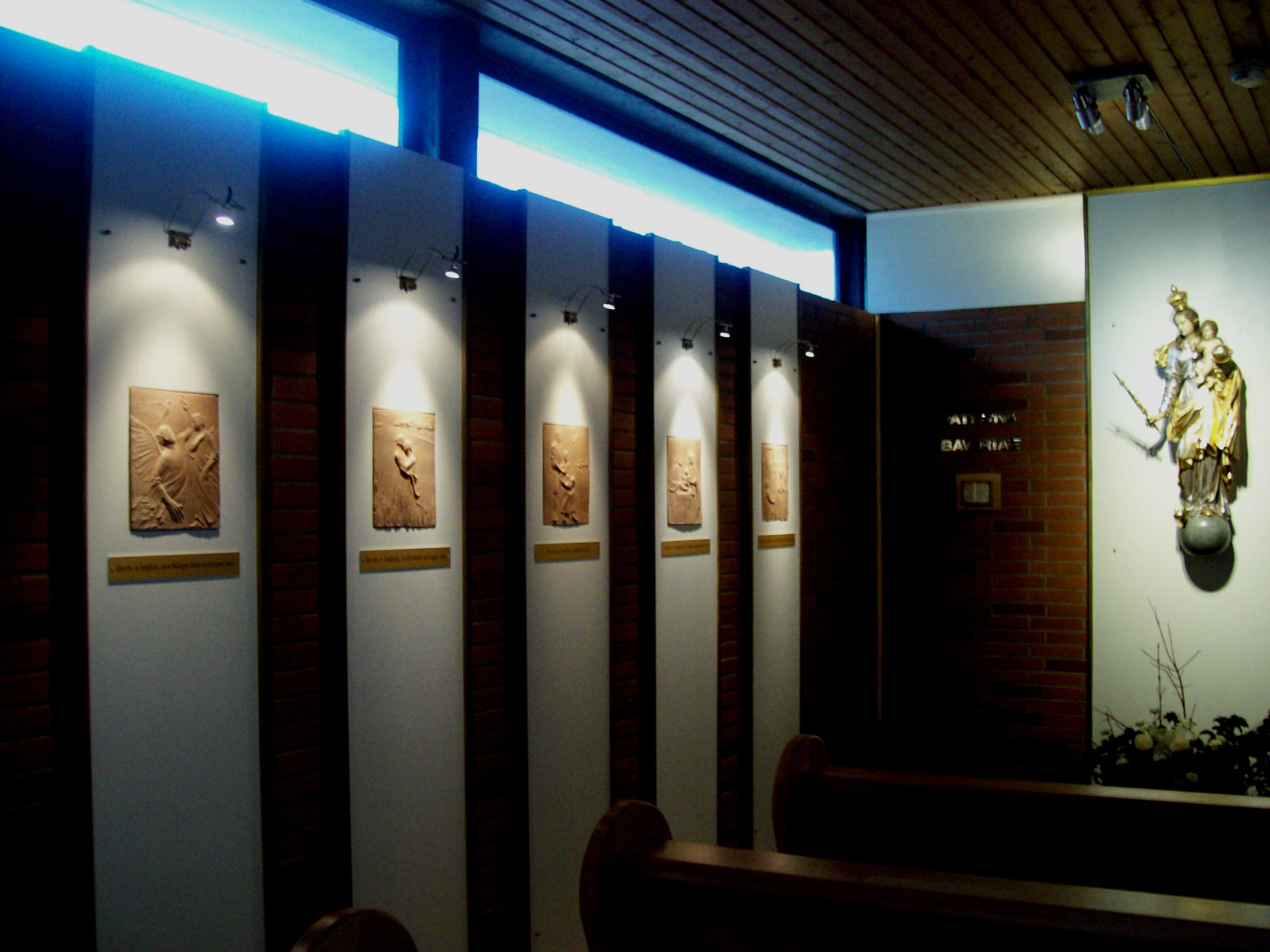 St. Matthäus (Aschaffenburg) - Gailbach Marienkapelle